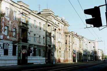 Irkutsk, ul. Amurskaja, 09/2001